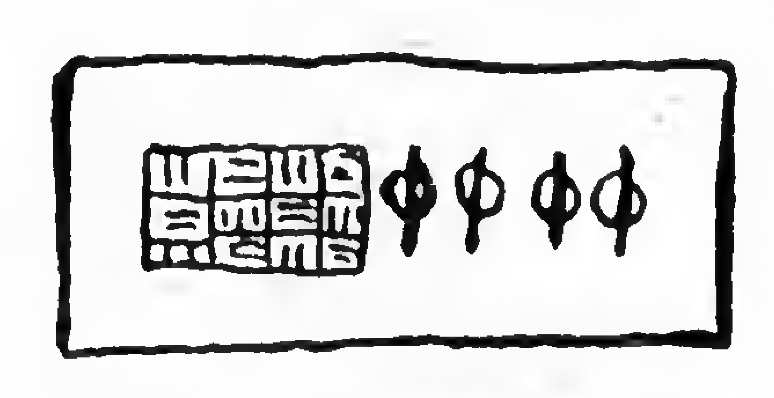 Imagen de la cuenta de un tributo pipil que fue transcrita por Francisco Antonio de Fuentes y Guzmán en su recordación Florida, la imagen según el autor procedía de un manuscrito o códice pipil procedente de la Alcaldía Mayor de Sonsonate (los actuales departamentos salvadoreños de Ahuachapan y Sonsonate) que le fue dada al autor por el licenciado y cura Juan de los Ríos. La imagen muestra una manta y cuatro símbolos que representan cada uno un tzonte (el número 400) dando a entender que se recolectaron 4 tzontes (lo que es igual a 1600) mantas.